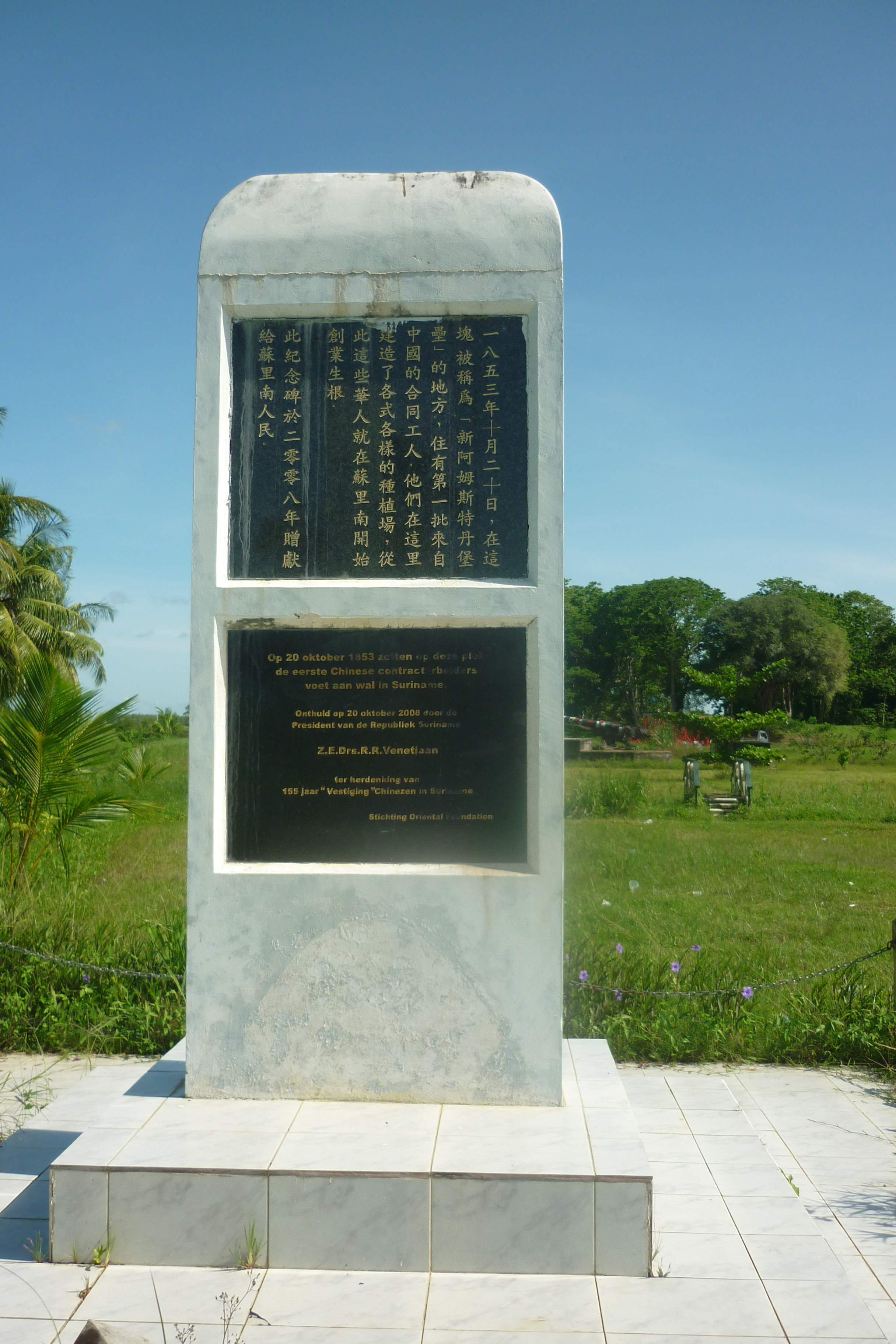 155 jaar Chinezen Monument bij Fort Nieuw-Amsterdam